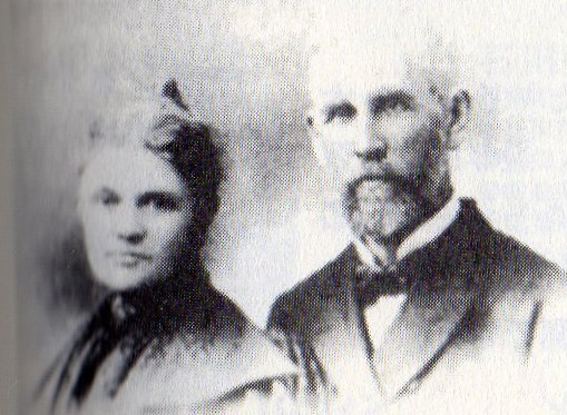 アメリカン・ボードの宣教師ジェローム・デイヴィス